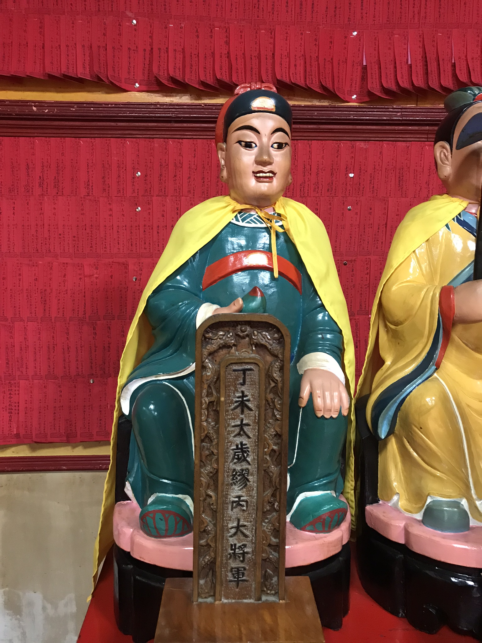 丁未太歲繆丙大將軍神像